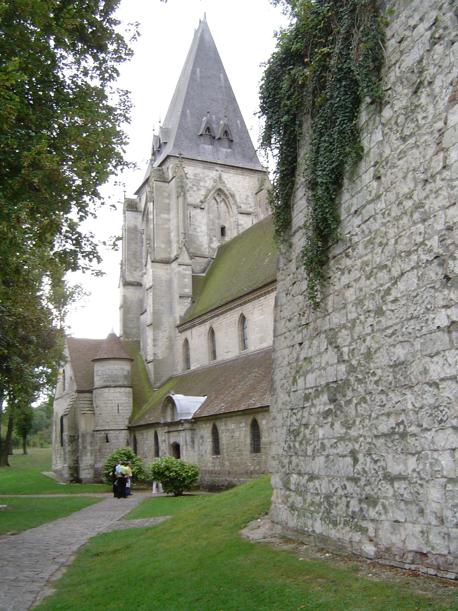 Château de Picquigny, côté église